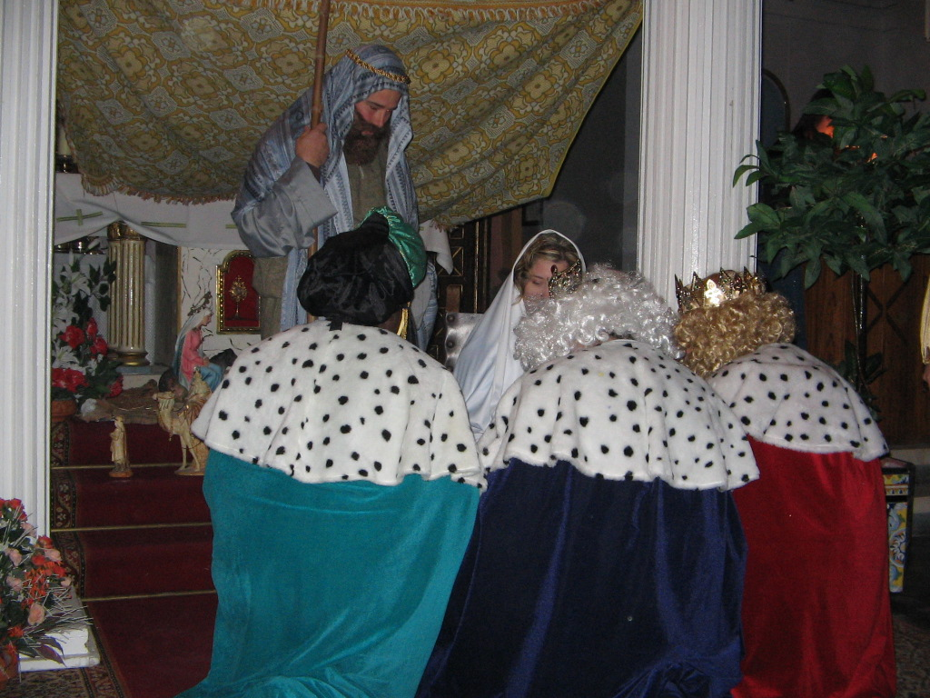 reyes